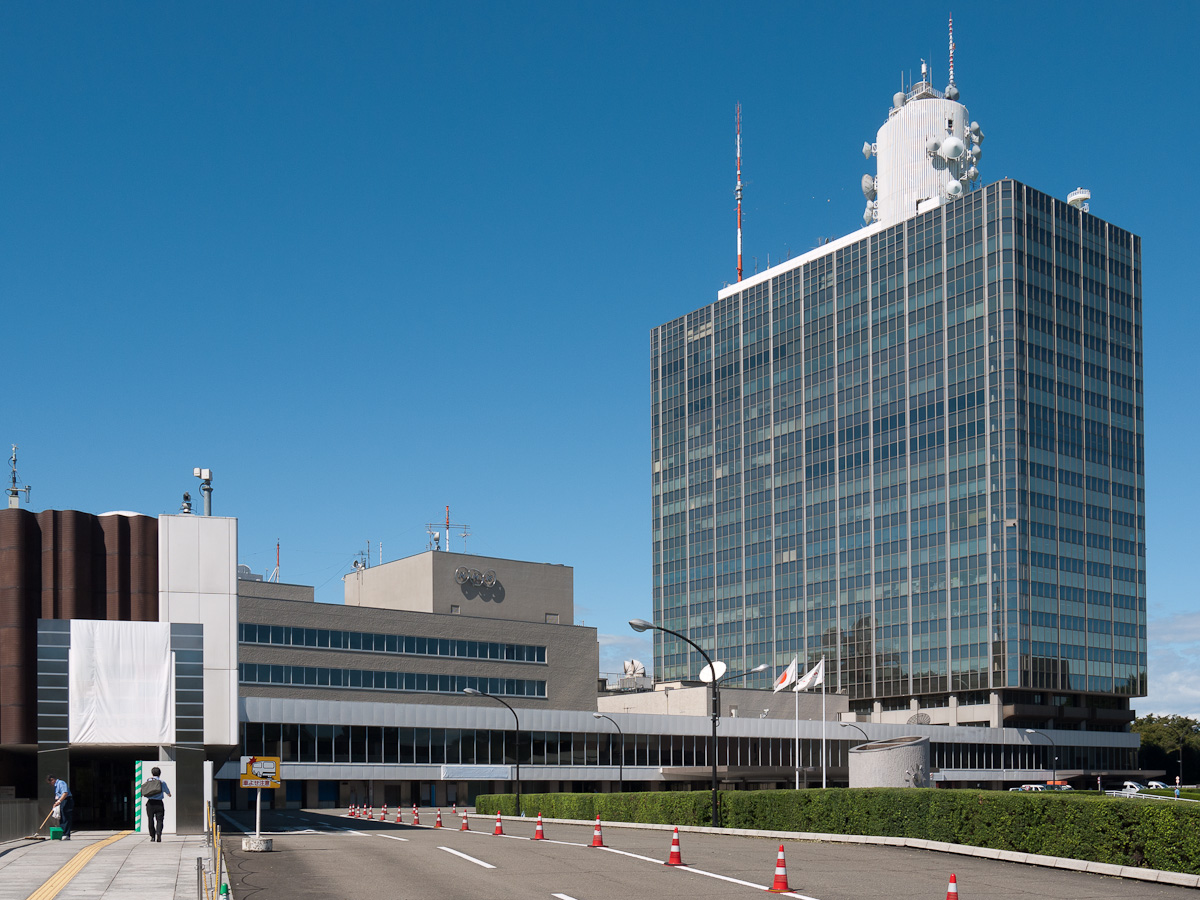 NHK放送センター、東京都渋谷区神南。